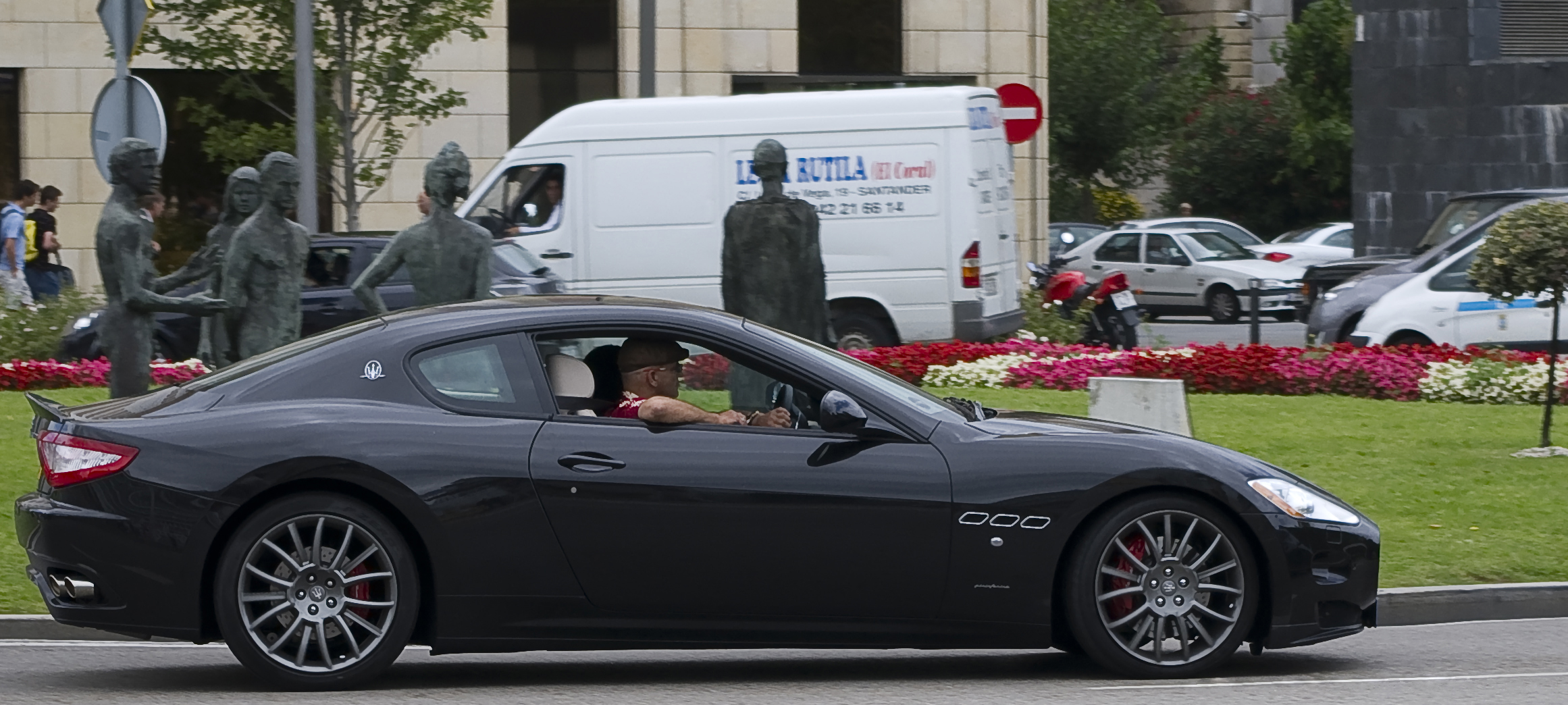 Maserati GranTurismo S Automatic